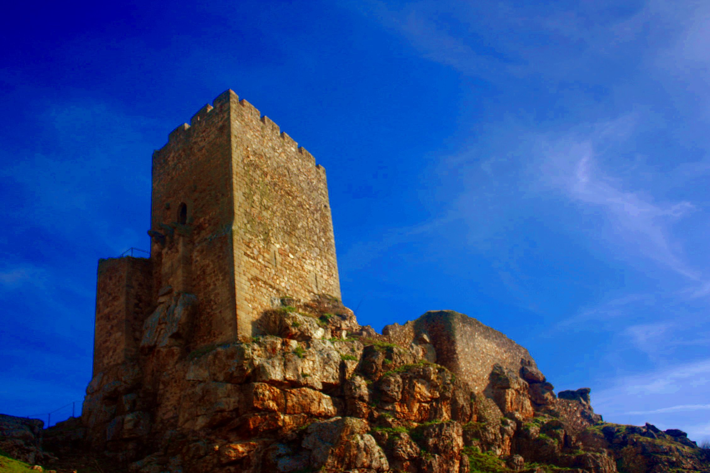 Vista geral. This monument is classified as Imóvel de Interesse Público. This file was uploaded for Wiki Loves Monuments in Portugal with the unique identifier 74124.